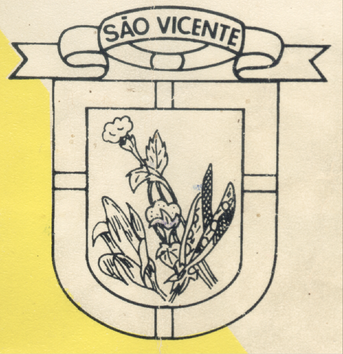 Bandeira de São Vicente RN